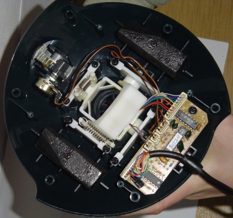 Dżojstik - wychylony w tył (oś Y))